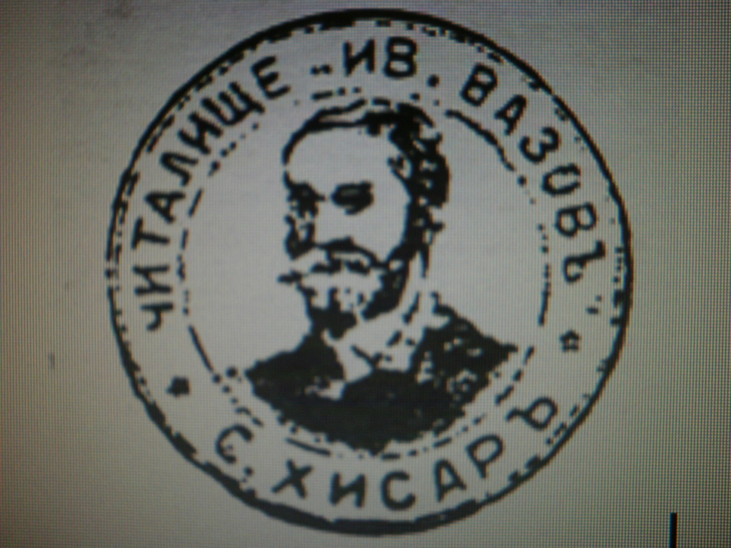 Печат на читалище "Иван Вазов 1904" Хисаря